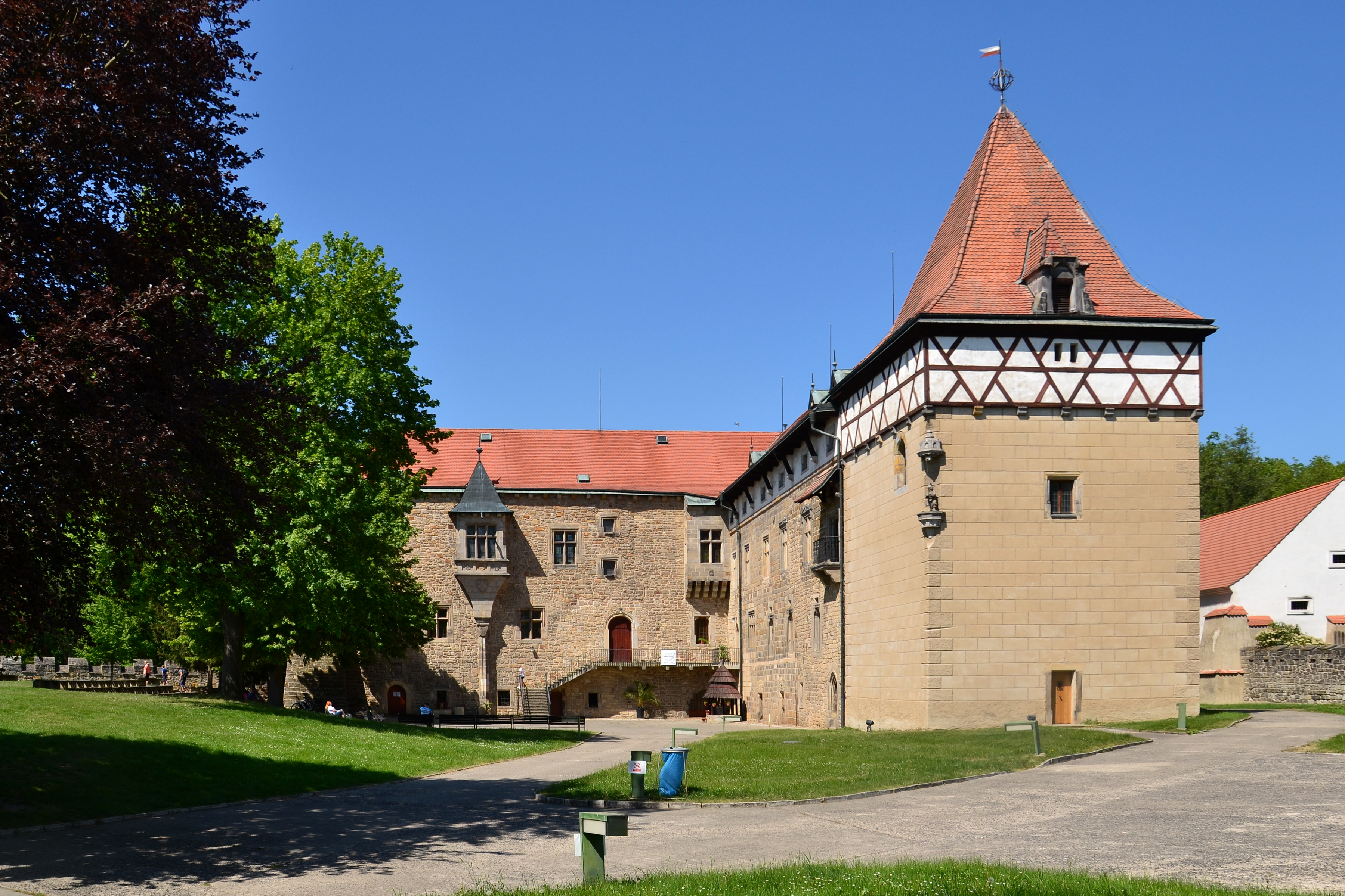 Hrad Budyně – hradní jádro